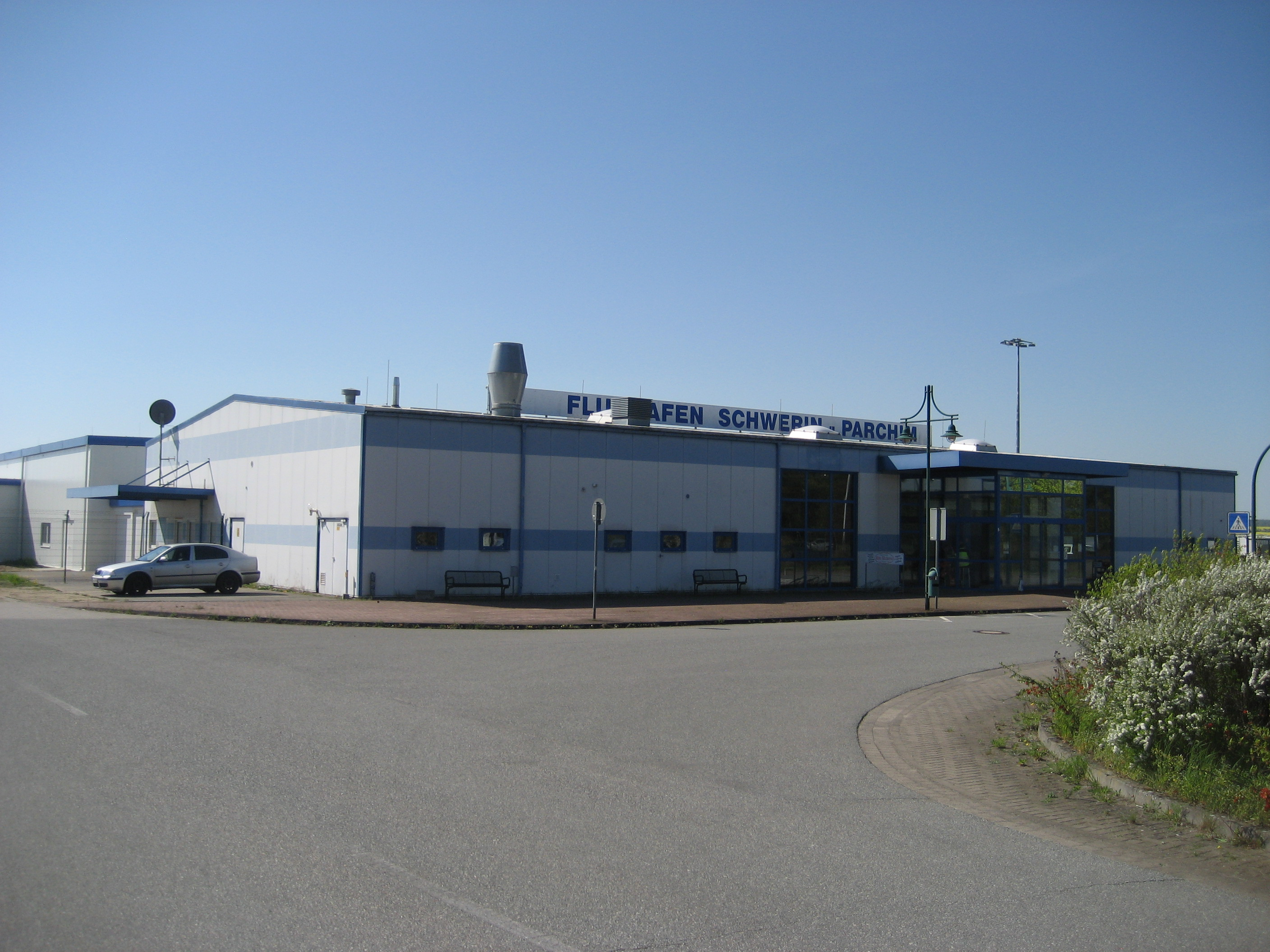 Flughafen Schwerin-Parchim: Flughafenterminal.